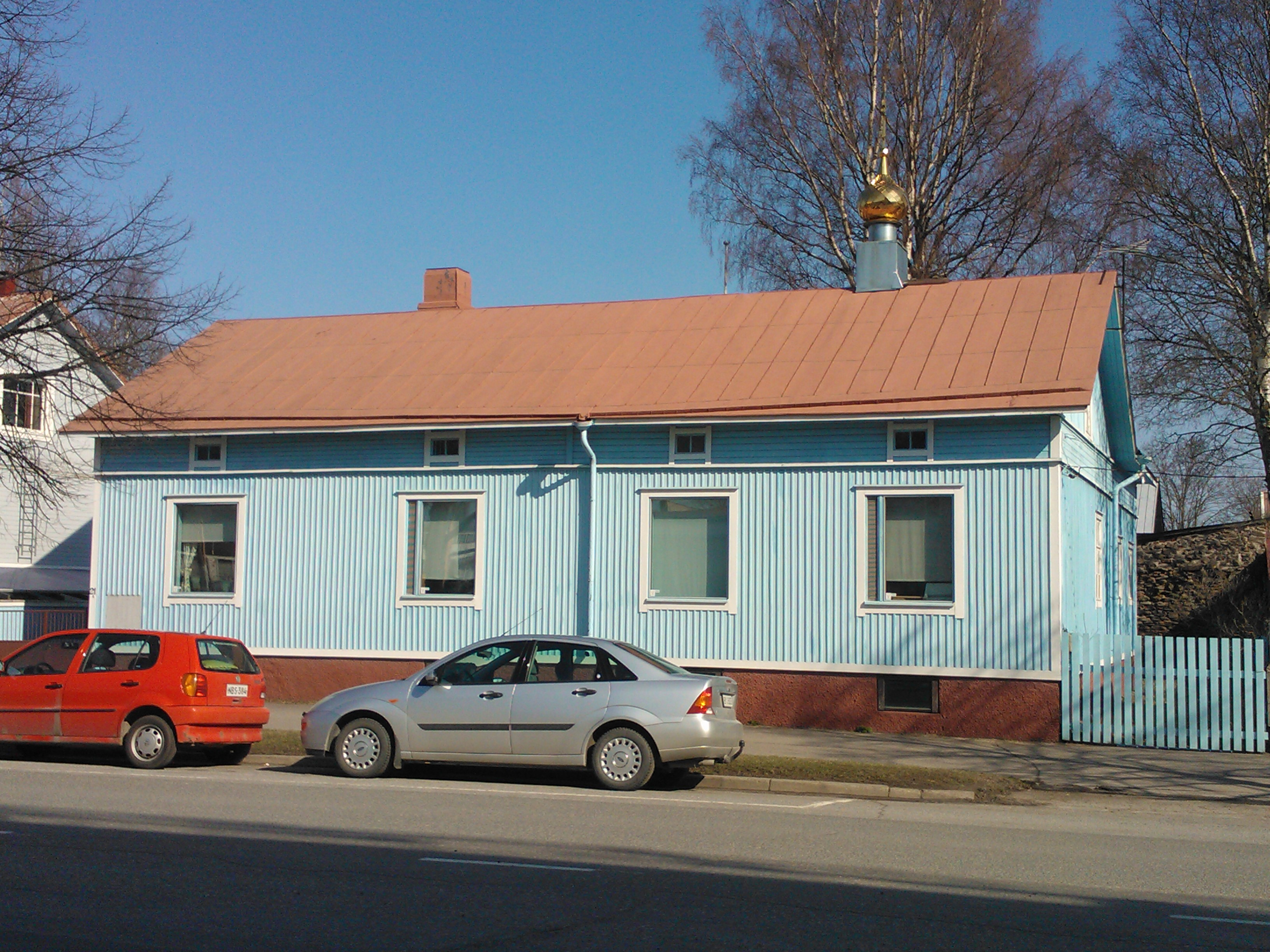 Церковь Казанской иконы Божией Матери в Пори, Русская православная церковь (Московский патриархат)